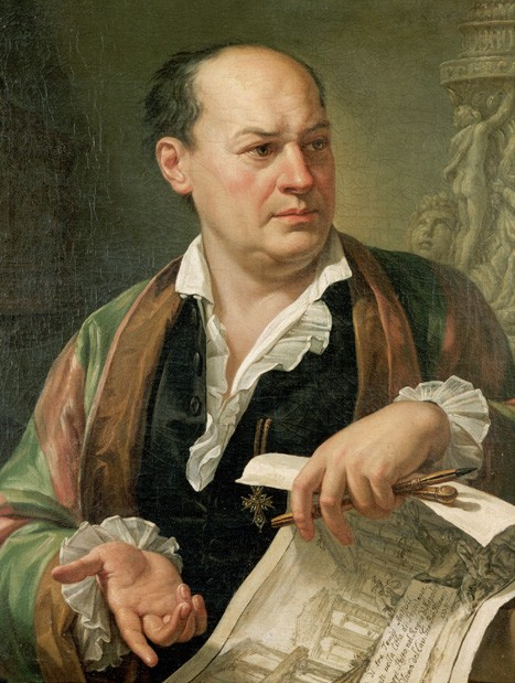 Posthumous Portrait of Giovanni Battista Piranesi (1720-1778)